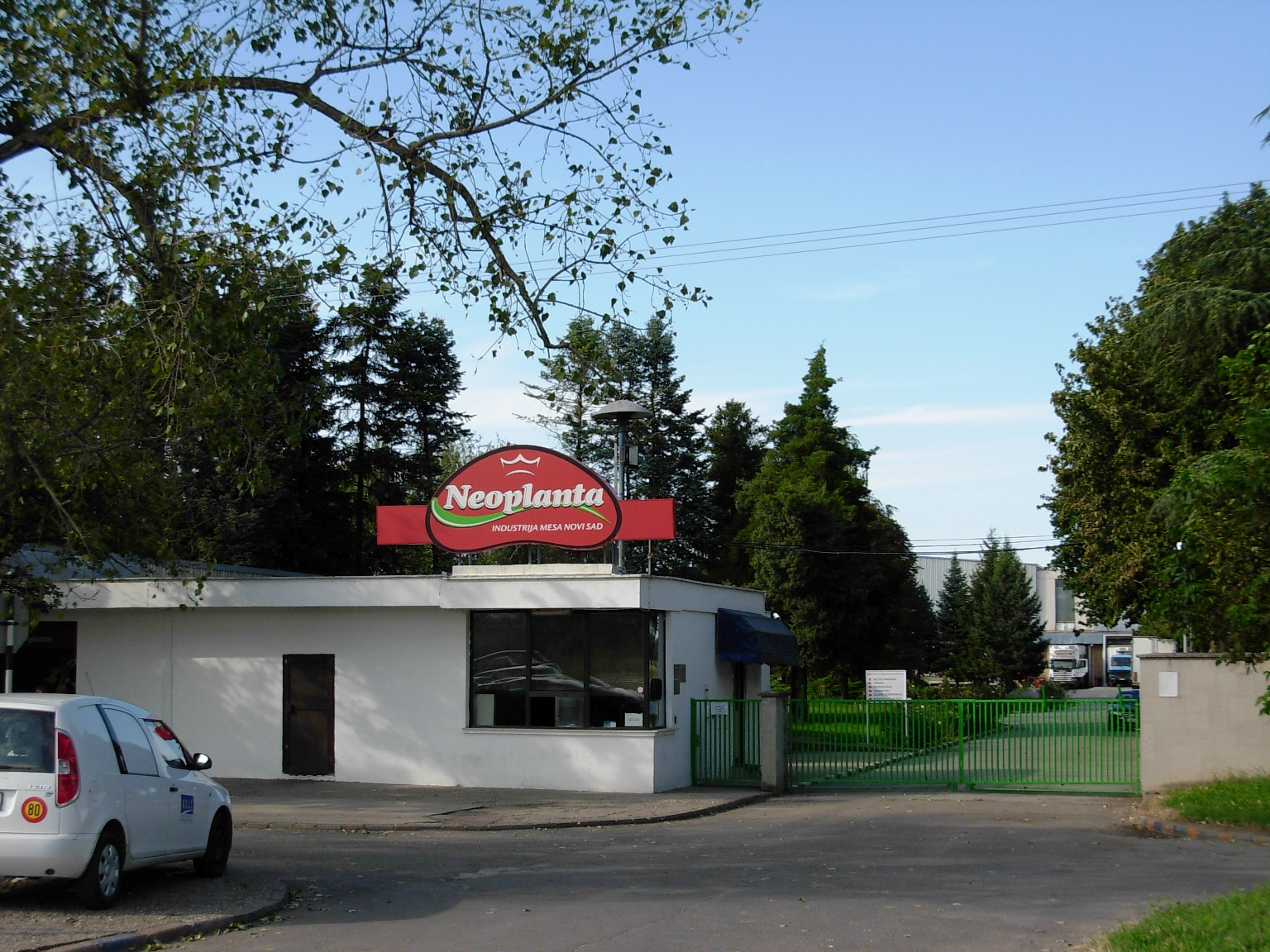 Ulaz u kompaniju "Neoplanta" u Novom Sadu.